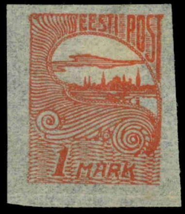 Почтовая марка Эстонии. Вид Таллина, 1920